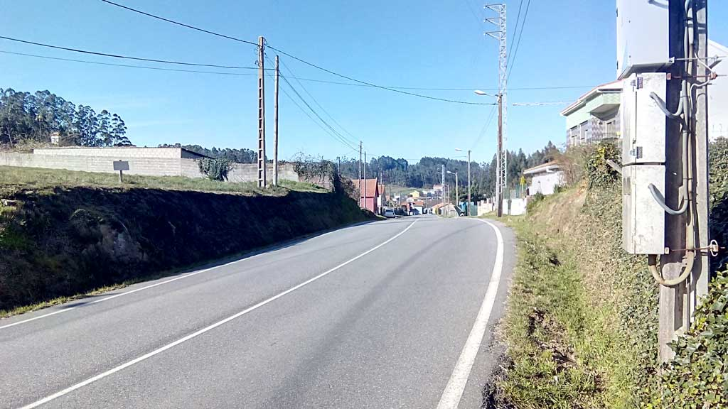 Vista de Prados, Sedes.